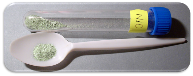 Oxid nikelnatý - NiO